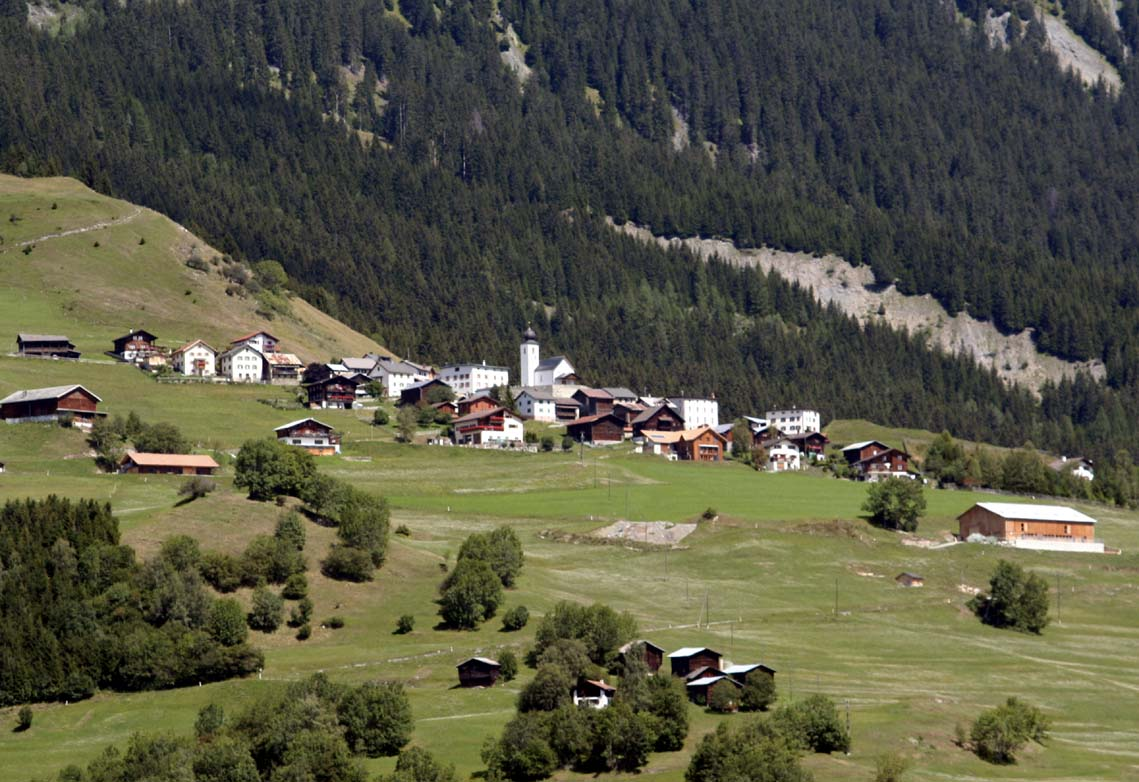 Riein